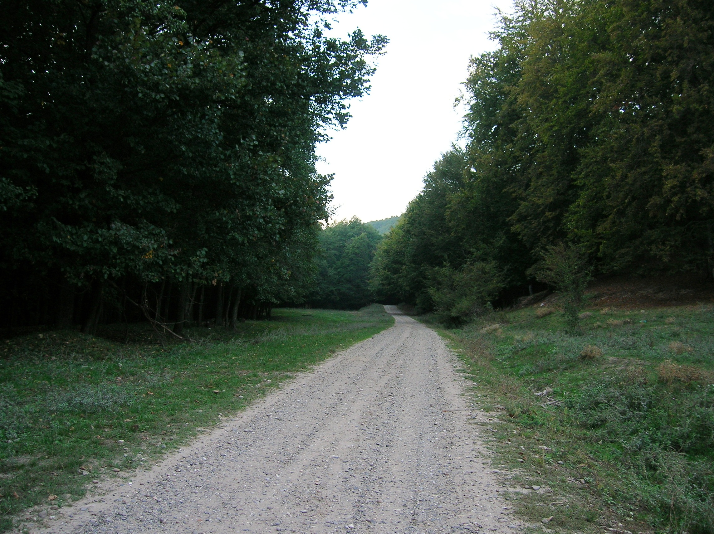 Comuna Valea Seacă Bacău - valea Văii Seci - Drumul axial prin pădure